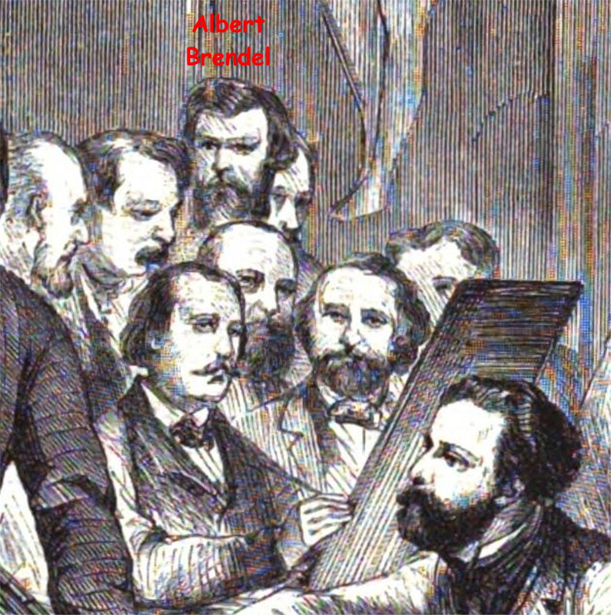 Albert Brendel, deutscher Maler im 19. Jh.